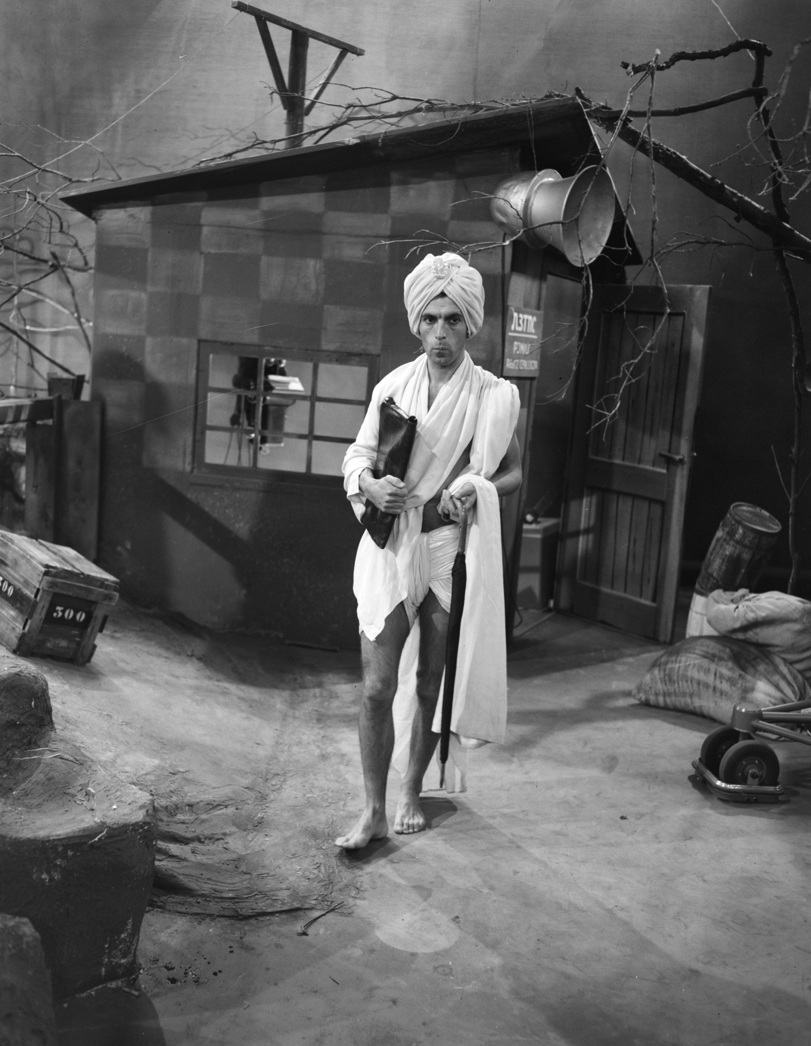 Collectie / Archief : Fotocollectie Anefo Reportage / Serie : [ onbekend ] Beschrijving : Televisiespel "Brug der zuchten" , Hans Culeman als Indier Annotatie : Televisiespel naar een comedie van Thomas Muschamp, vertaald door Nel Bakker en gespeeld door Toneelgroep Theater. Regie: Lo van Hensbergen. Productie: Ben Mettrop Datum : 5 oktober 1960 Trefwoorden : acteurs, actrices, televisiedrama's, toneel Persoonsnaam : Culeman, Hans Fotograaf : Fotograaf Onbekend / Anefo Auteursrechthebbende : Nationaal Archief Materiaalsoort : Negatief (zwart/wit) Nummer archiefinventaris : bekijk toegang 2.24.01.04 Bestanddeelnummer : 934-6330 Reacties Geplaatst door Maaike op 29 september 2013 - 15:45. Persoonsnamen: Hans Culeman (dus niet Heins Culemans)